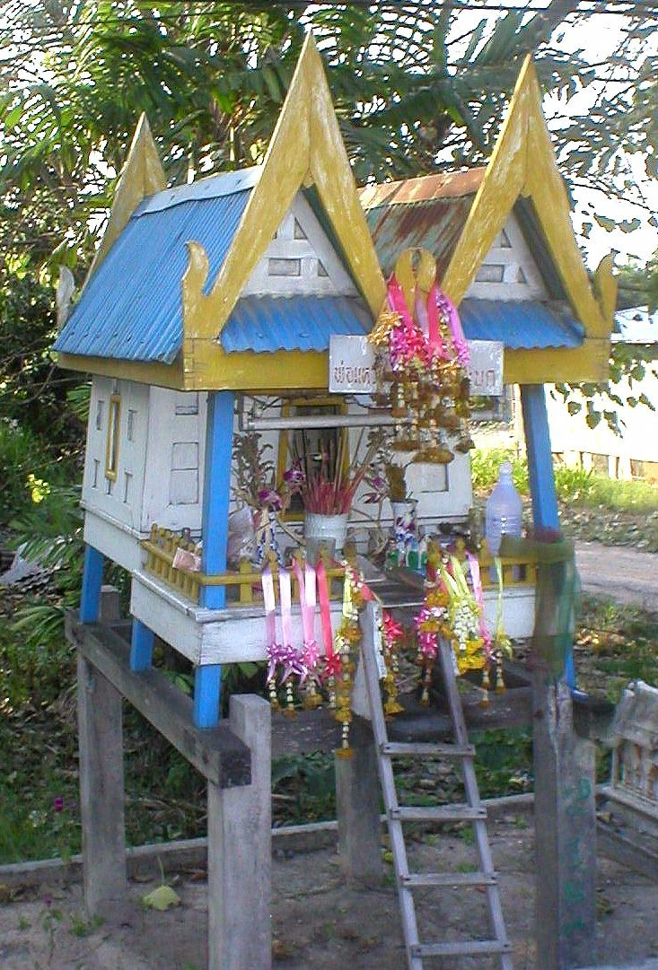 Maison des esprits (Thaïlande) Une maison des esprits (Culte animiste) de construction artisanale. Prise de vue personnelle. Pattaya (Thaïlande) Novembre 2004 Utilisateur:Siren